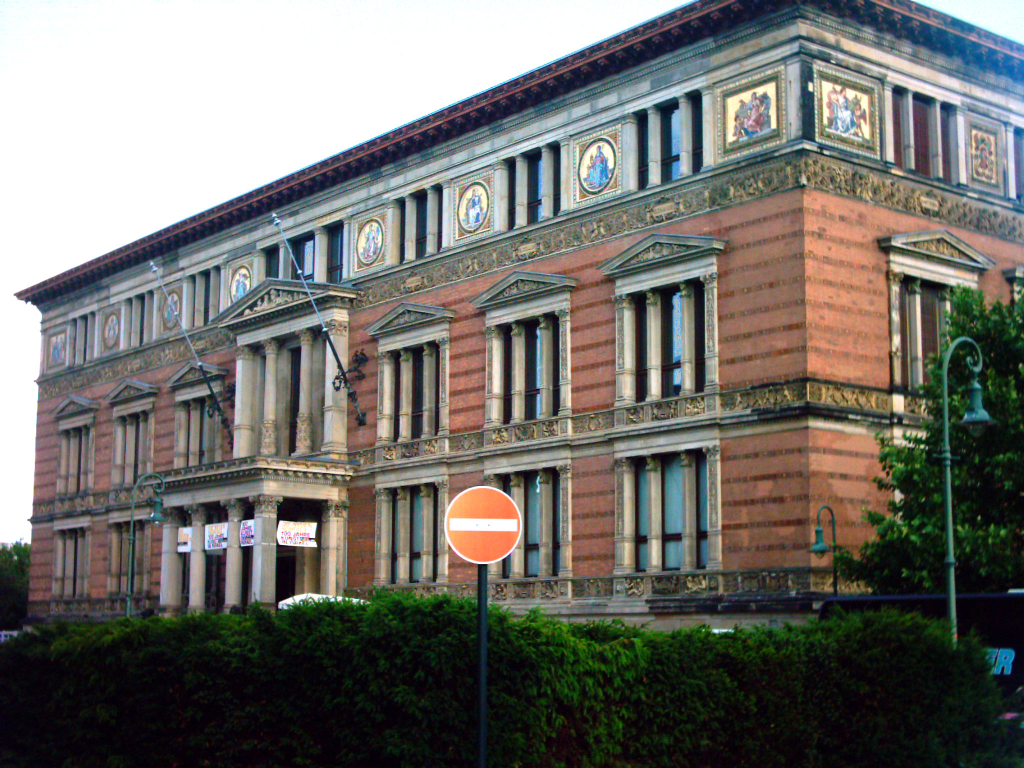 Martin-Gropius-Bau: total view